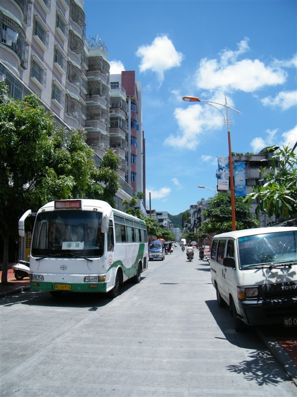 09年的红桥路，视角为由南向北。16路公车。在广文书店南。